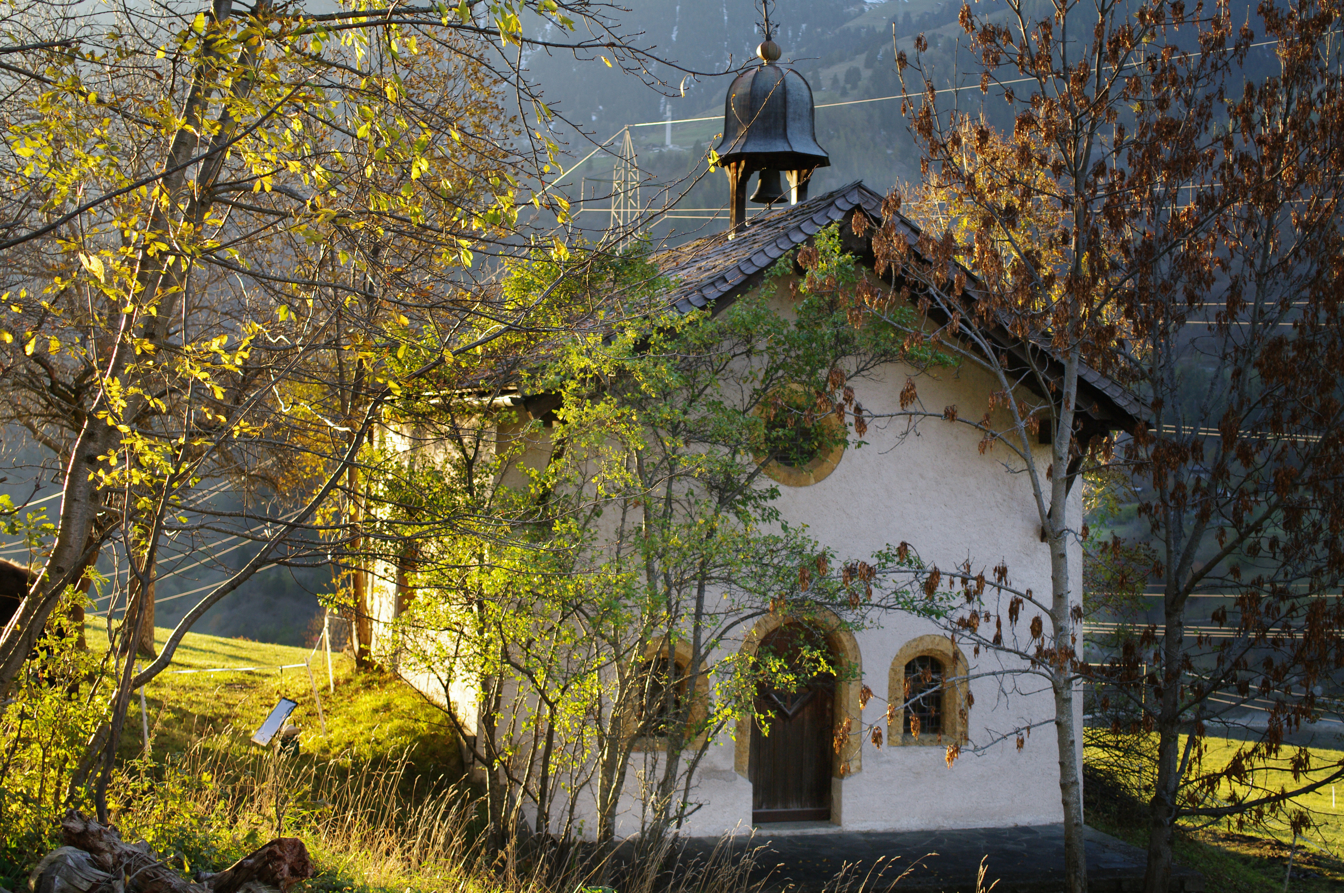 Ort: Bister. Foto: Brigitte Wolf